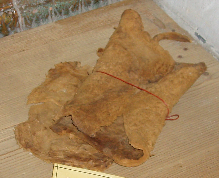 Zunder